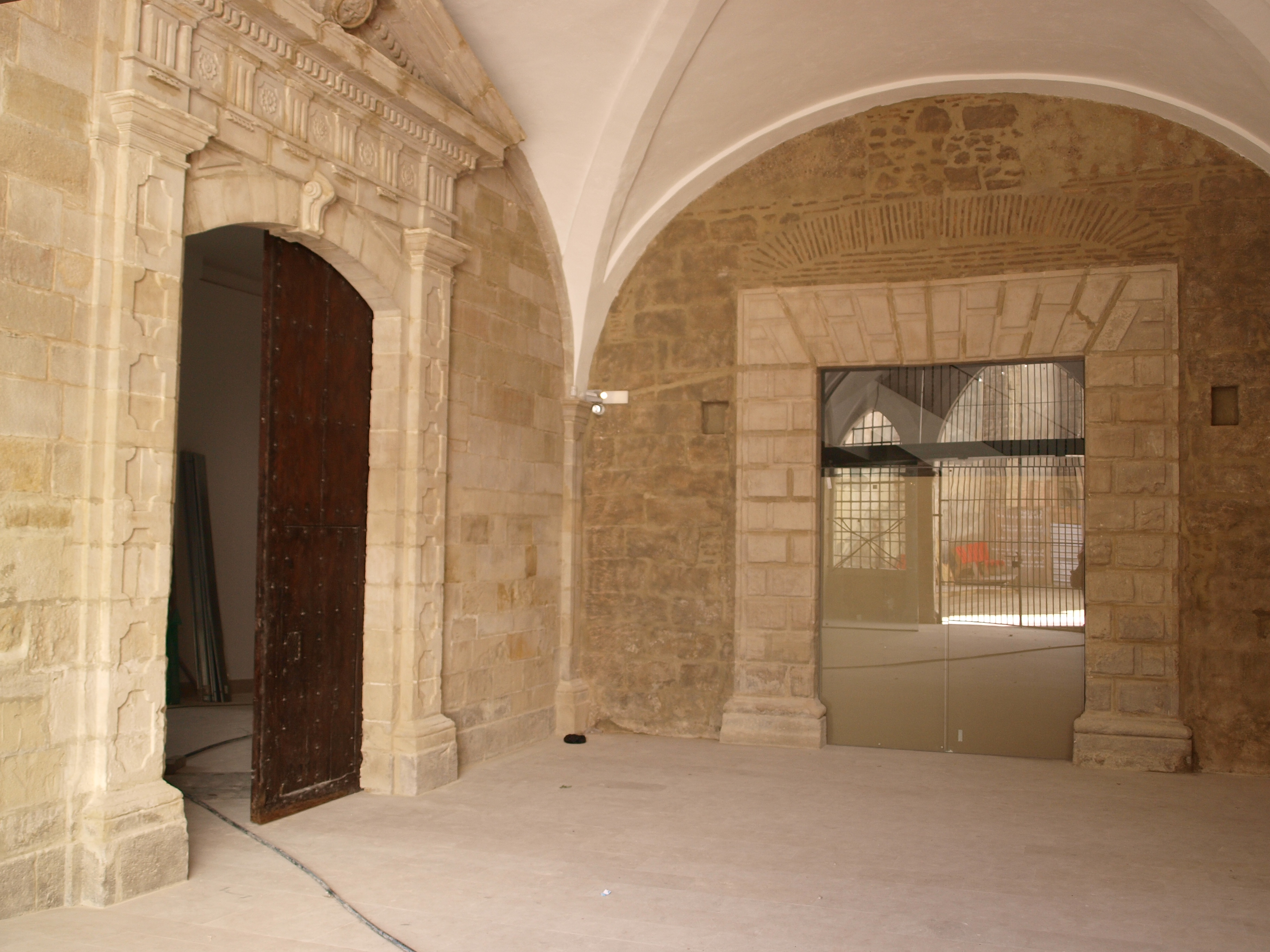 Espai d'entrada de l'antic convent del Roser de Lleida